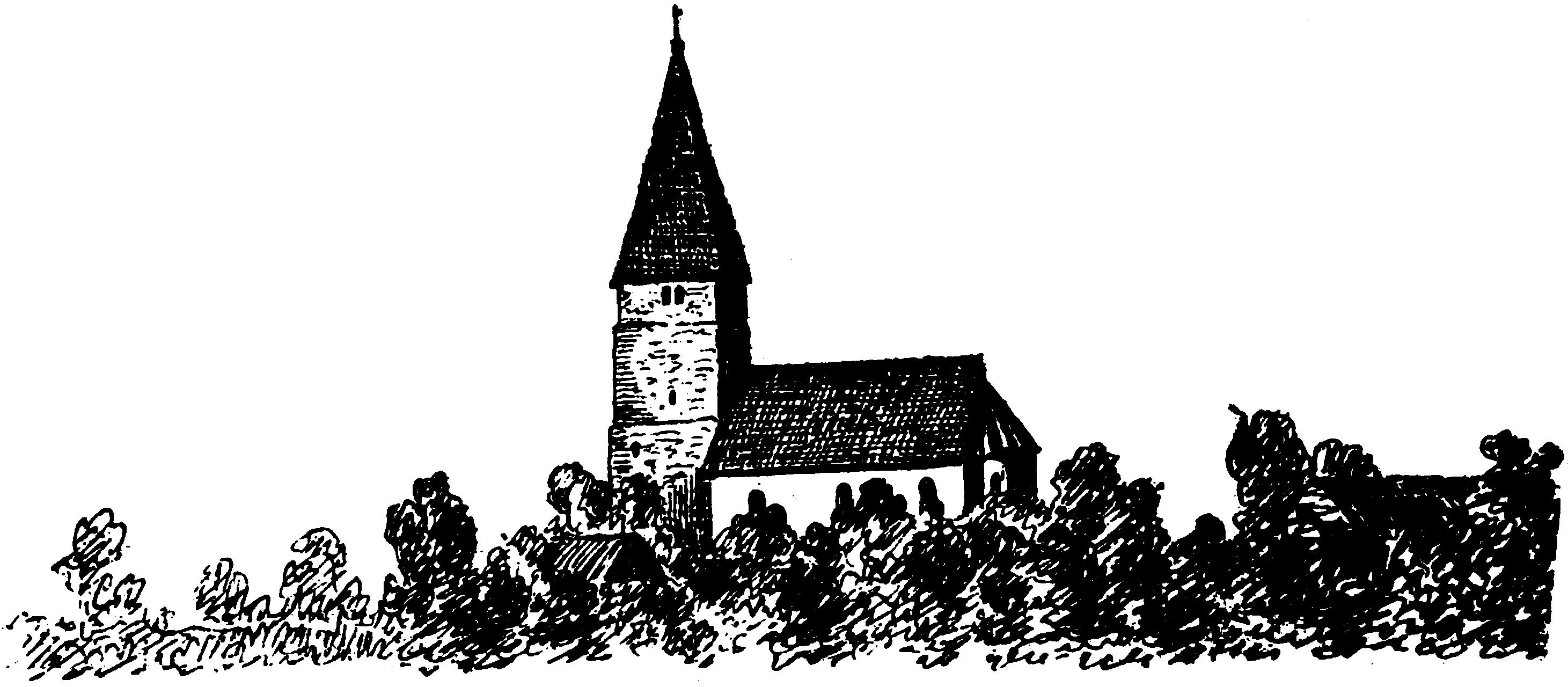 Bjälbo kyrka i Östergötland. Teckning i "Utdrag af Antiqvitets-Intendenten P. A. Säves afgifna berättelse för år 1861", publicerad i Antiqvarisk tidskrift för Sverige band 1, 1864.